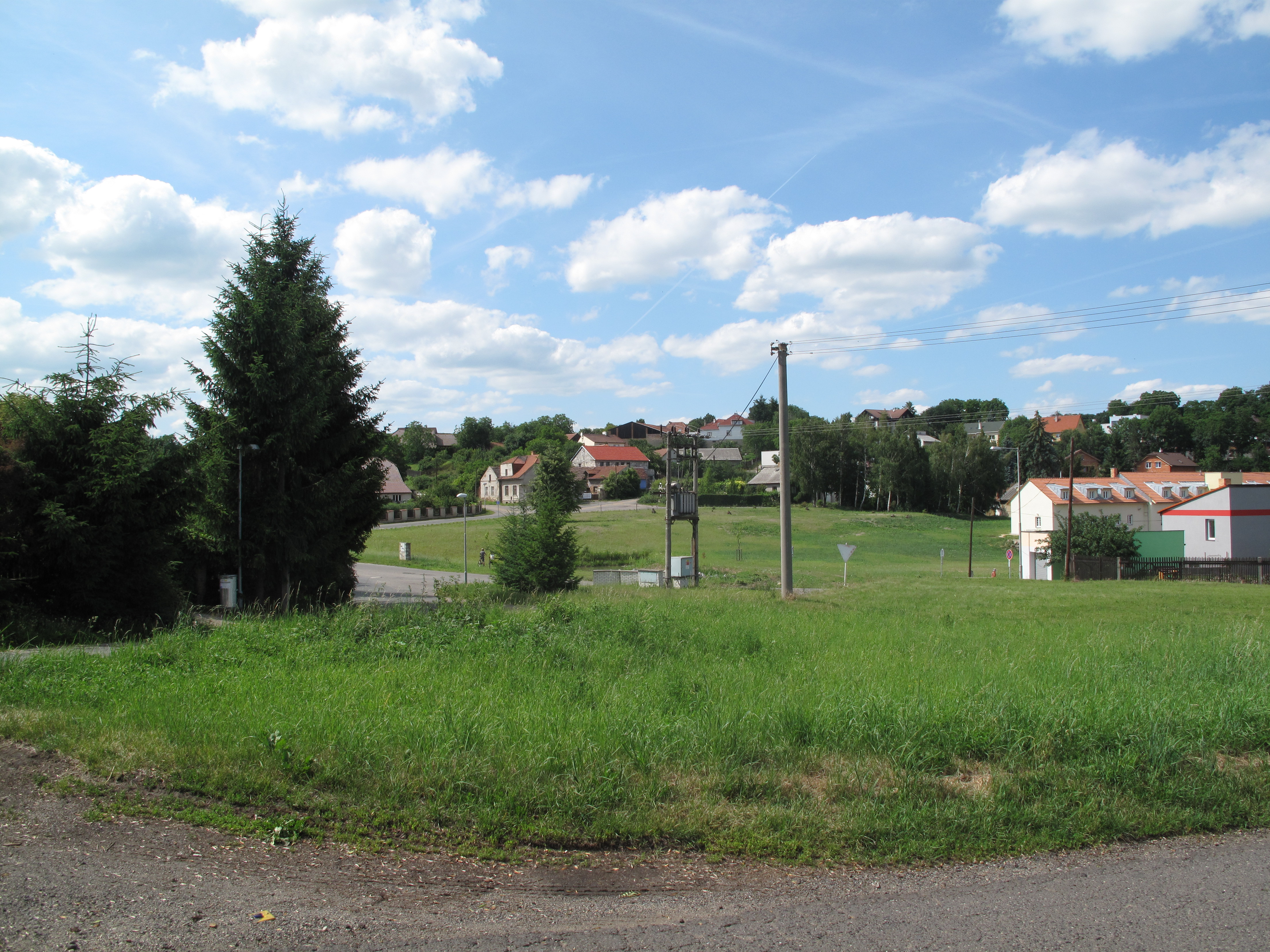 Sedlec, obec v okrese Praha-východ